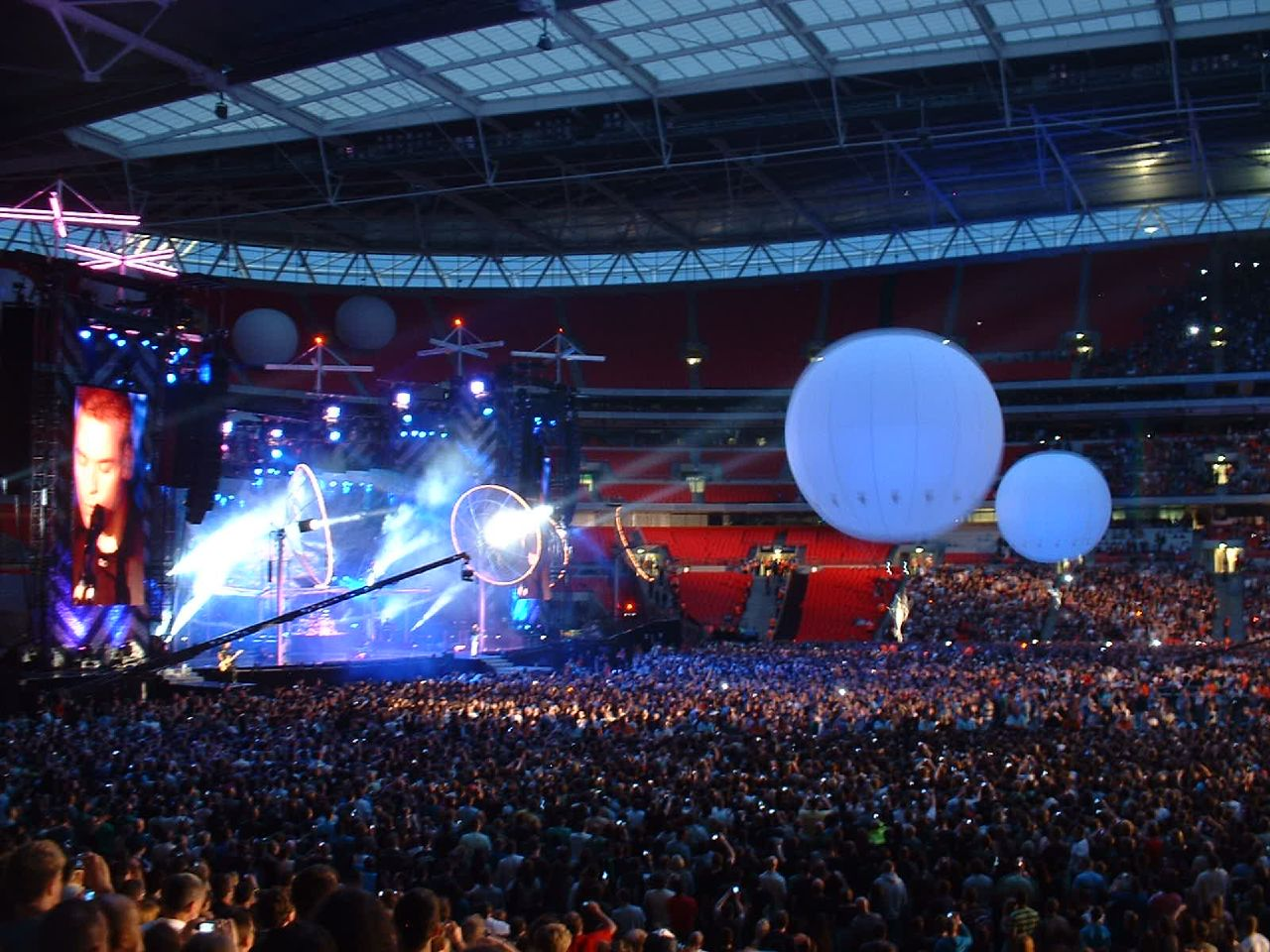 Muse na Wembleyu 2007